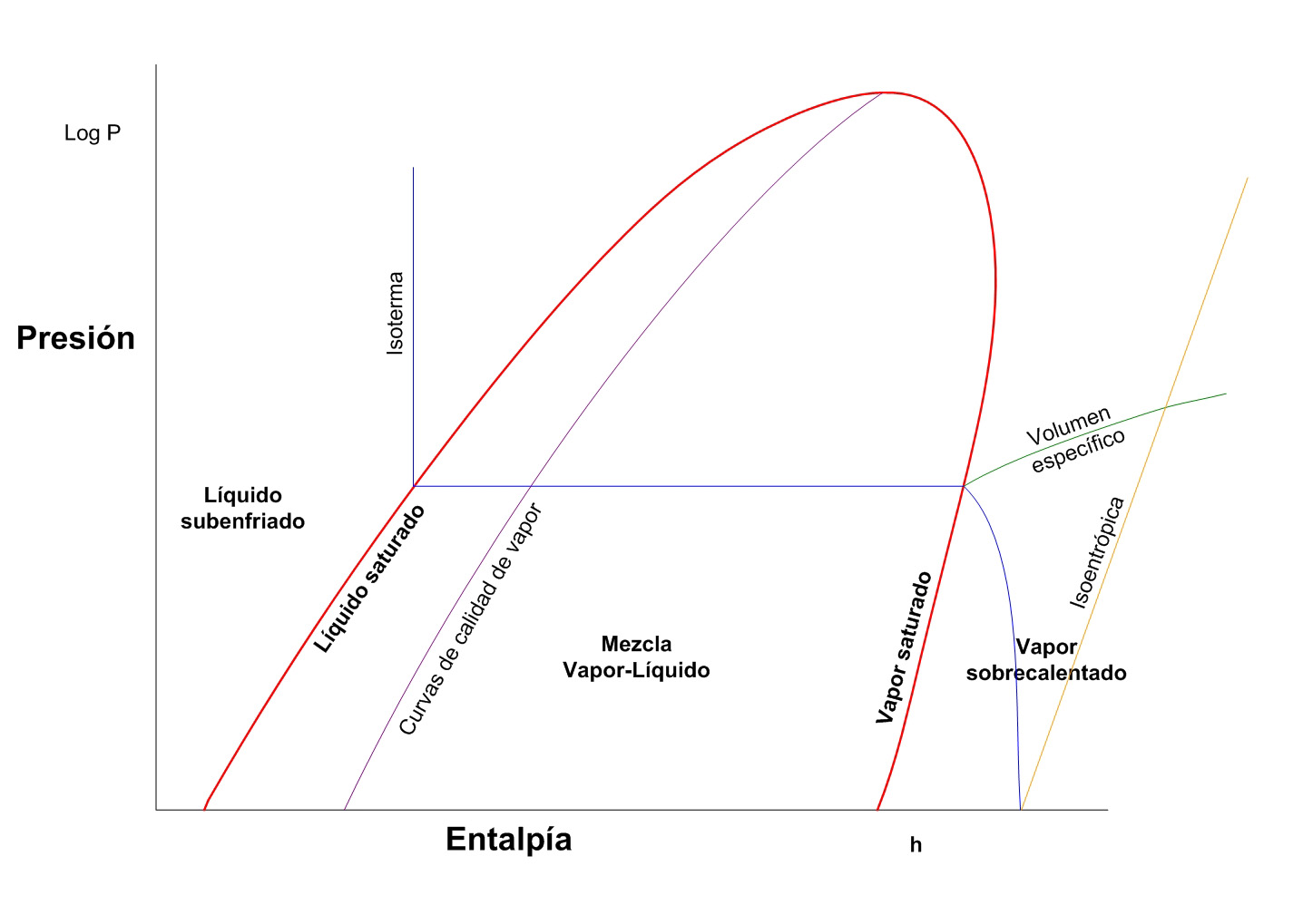 Diagrama Ph y principales trazas